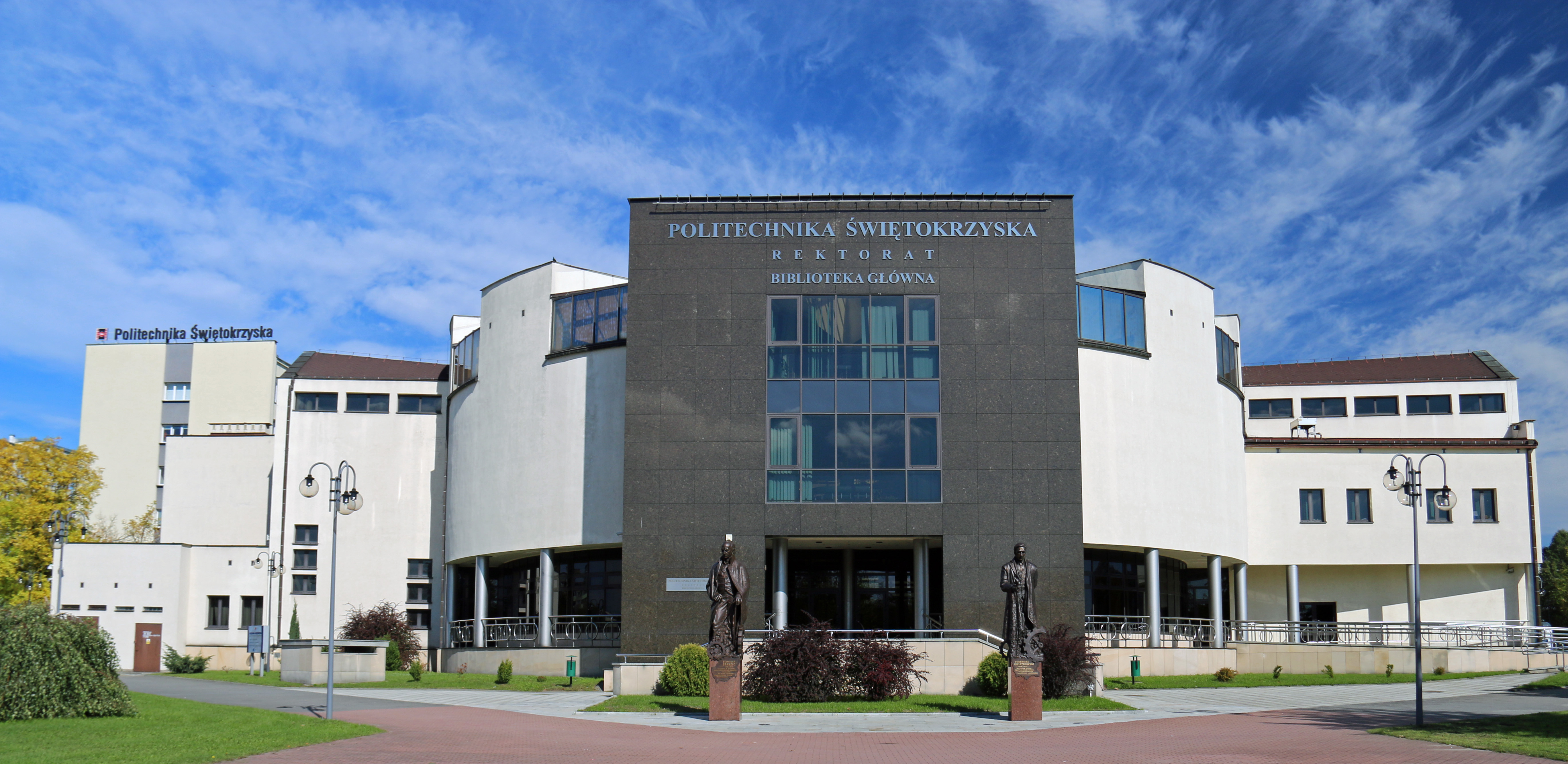 Gmach Rektoratu i Biblioteki Głównej Politechniki Świętokrzyskiej z pomnikami Stanisława Staszica i Eugeniusza Kwiatkowskiego